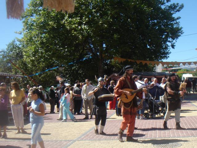 feria de los oficios pinilla del valle